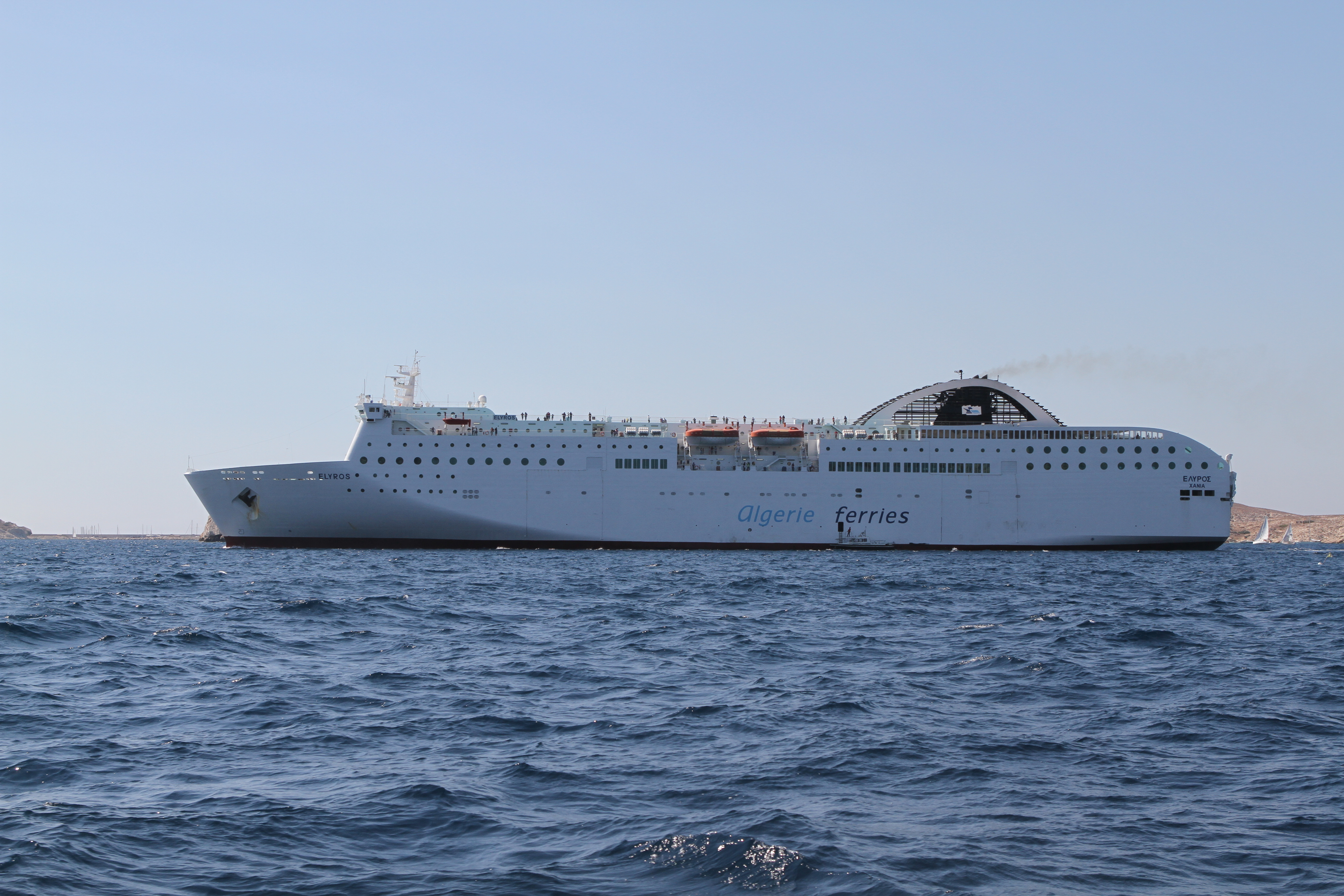 Le navire grec Elyros, affrété par Algérie Ferries, quittant le port de Marseille (France)